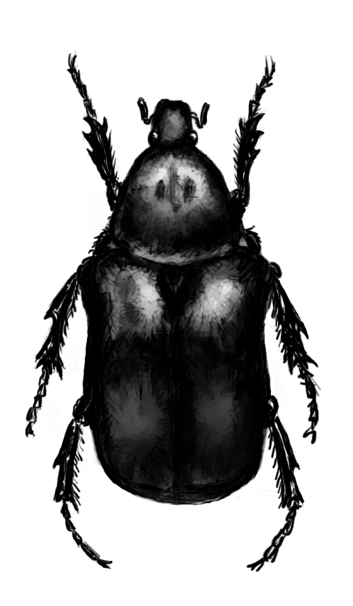 Dessin de scarabé en noir et blanc retouché